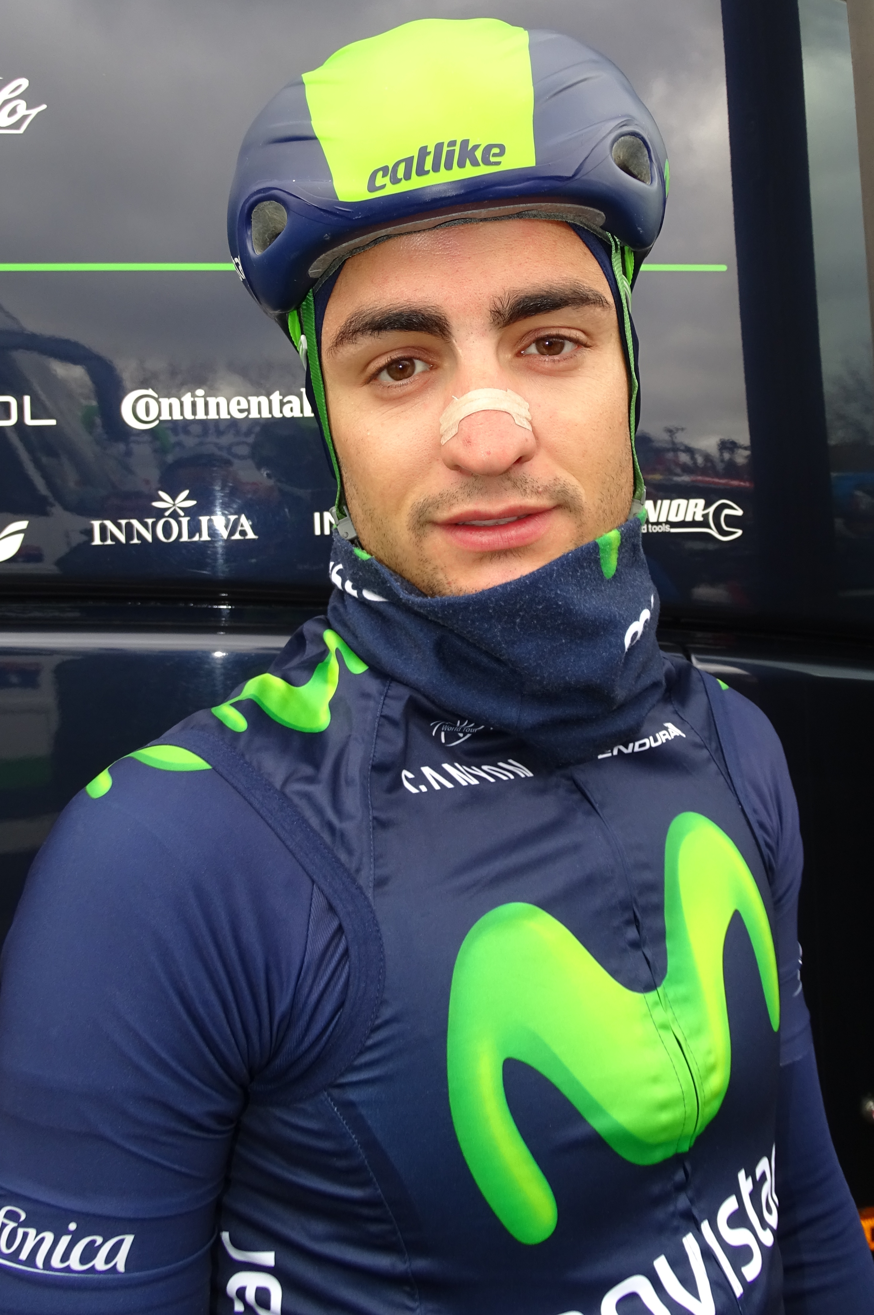 Reportage réalisé le mardi 31 mars à l'occasion de du départ de la première étape des Trois jours de La Panne 2015 à La Panne, Belgique.